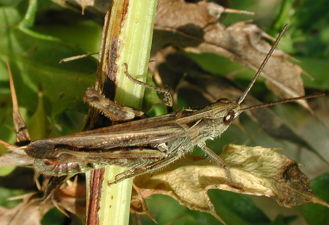 Chorthippus biguttulus, male, NSG Kirchwerder Wiesen, Elbmarsch bei Hamburg, Germany